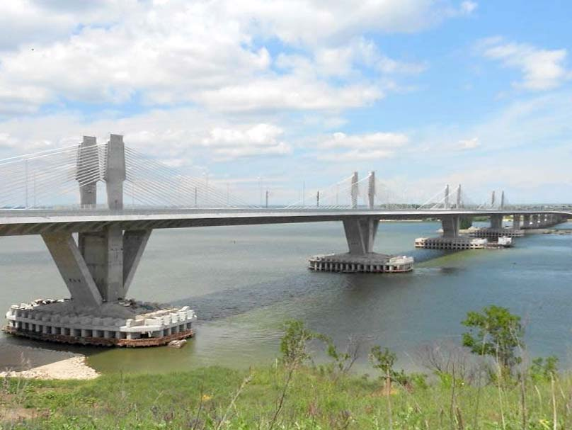 Ansicht der Schrägseilbrücke